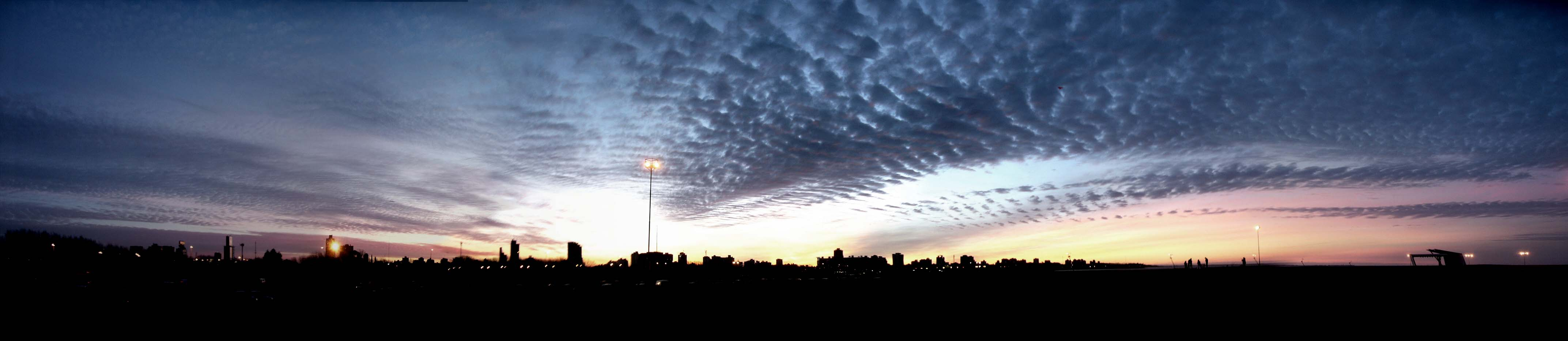 Atardece sobre el Paseo de la Costa de Vicente López